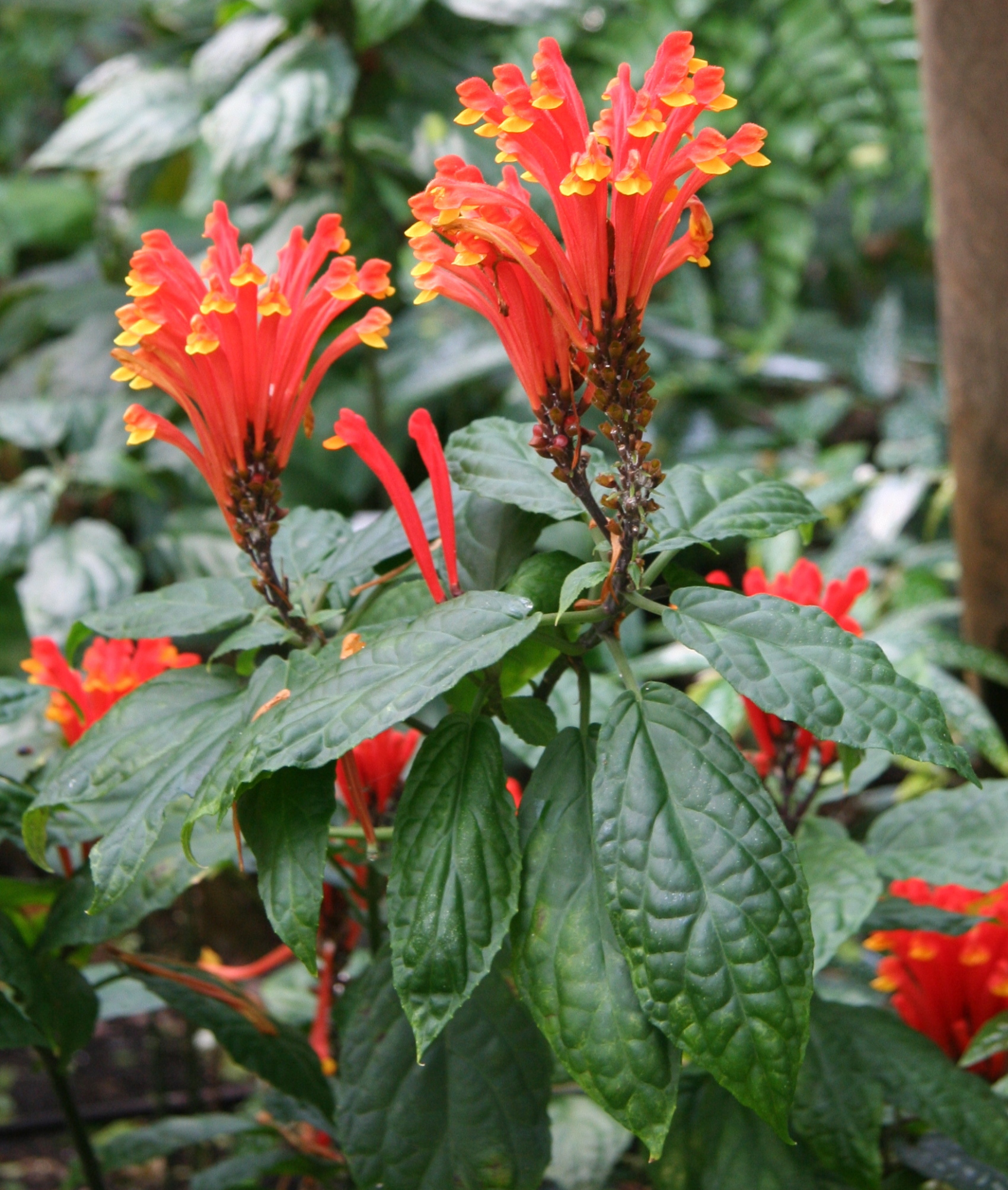 Scutellaria mociniana im Botanischen Garten Dresden